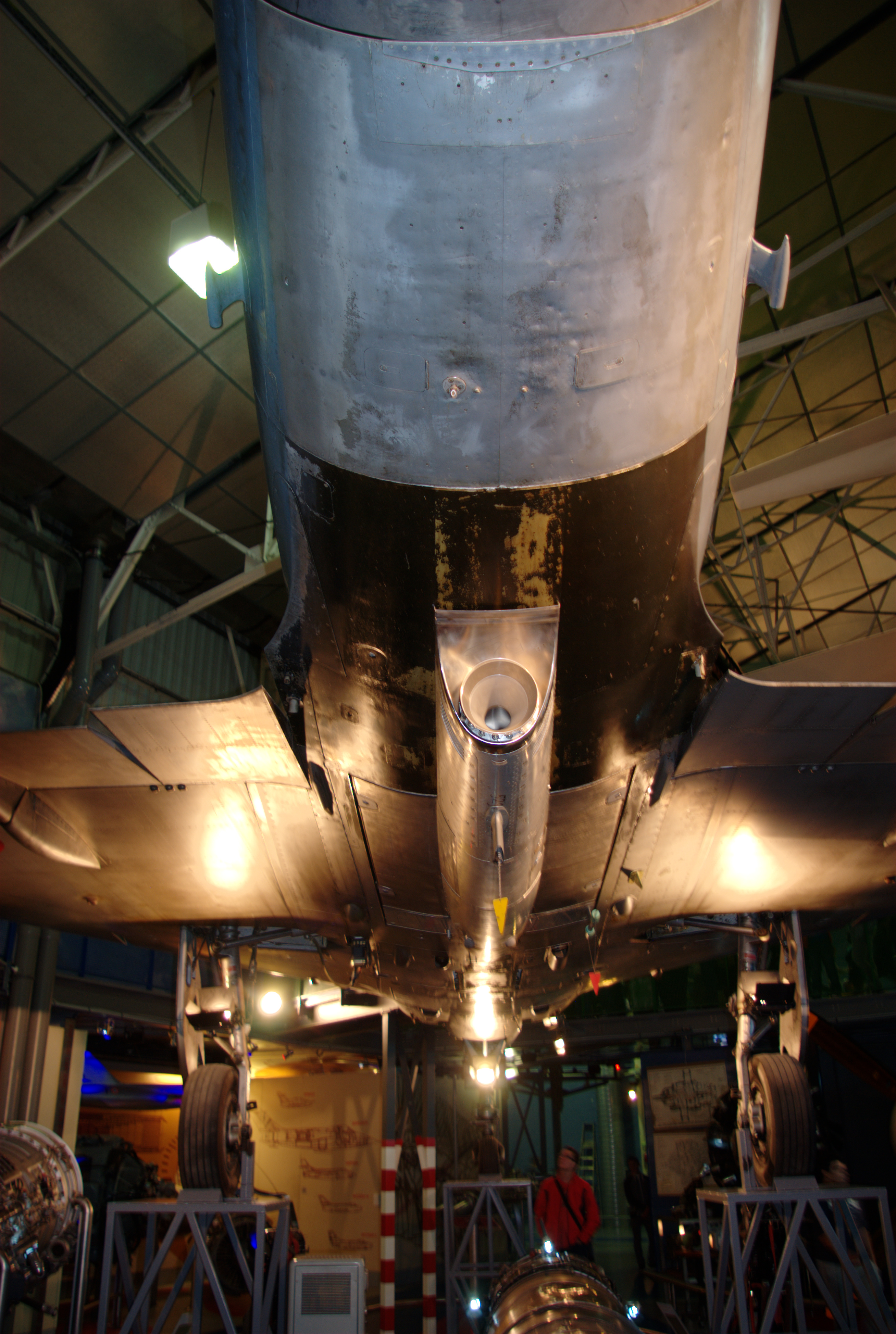 Vue d'un moteur-fusée SEPR 841 installé sous un Mirage IIIC au musée Safran.